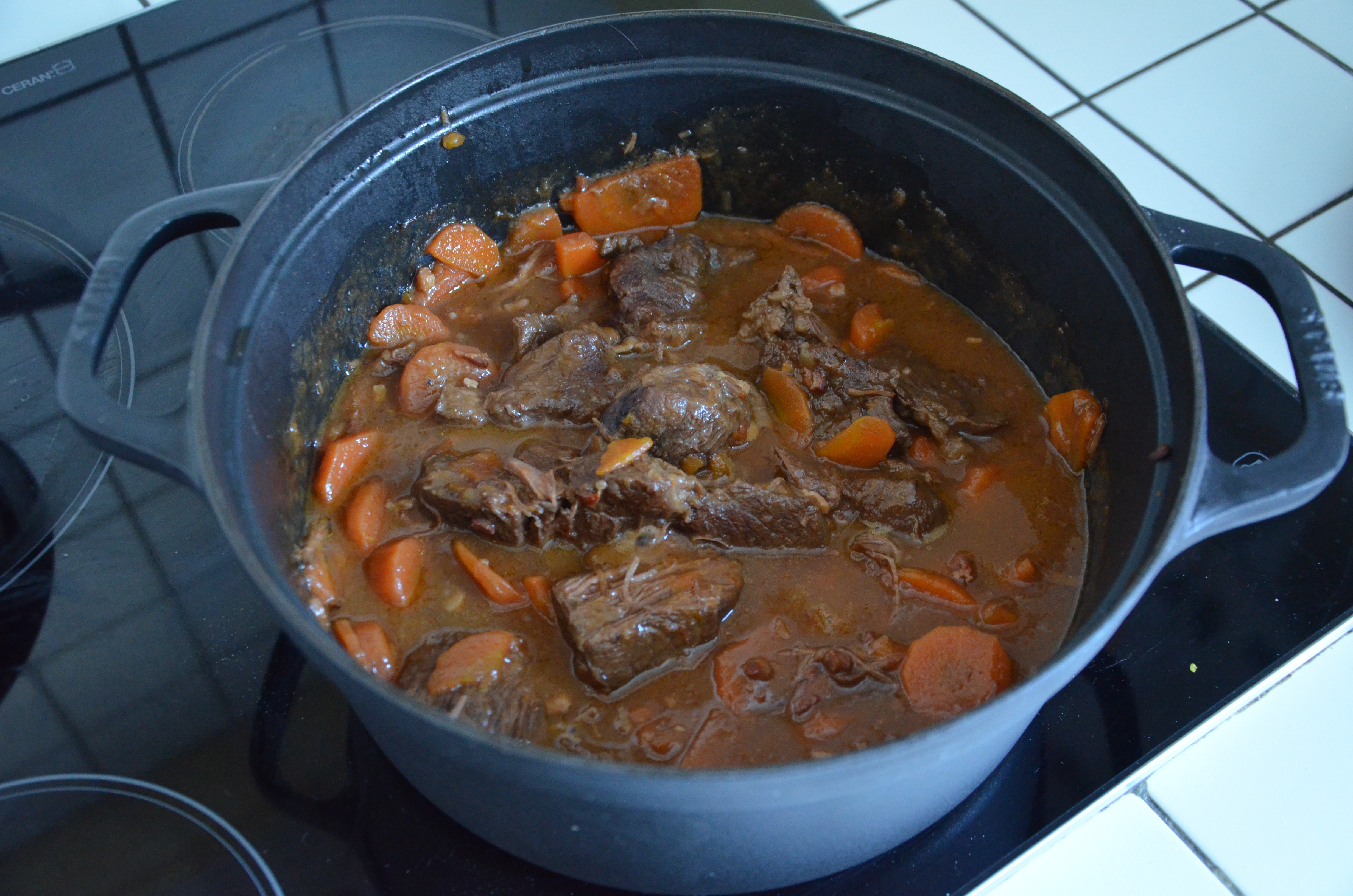 Boeuf mode.